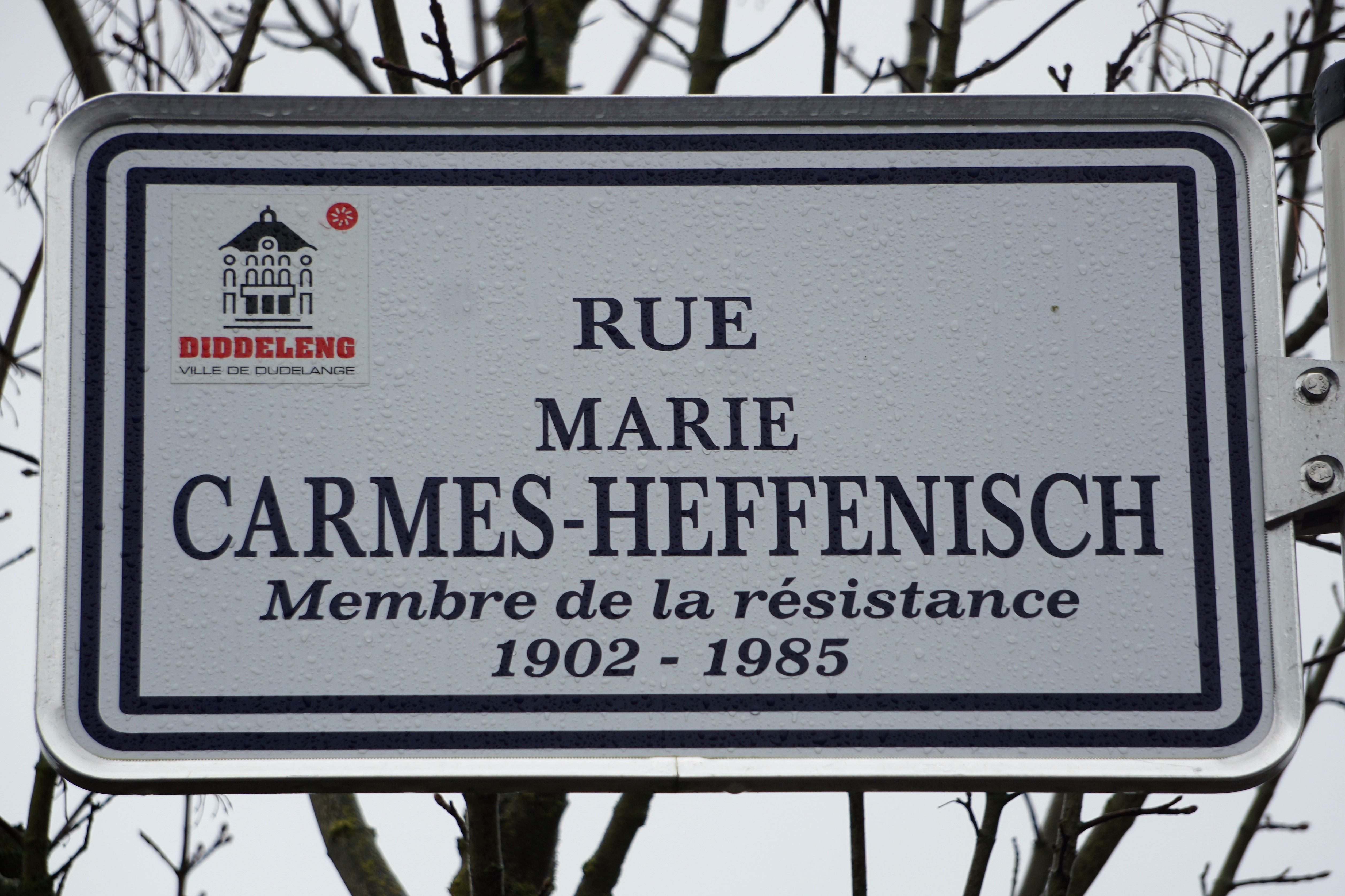 Plaque de nom de rue à Dudelange, quartier Lenkeschléi.